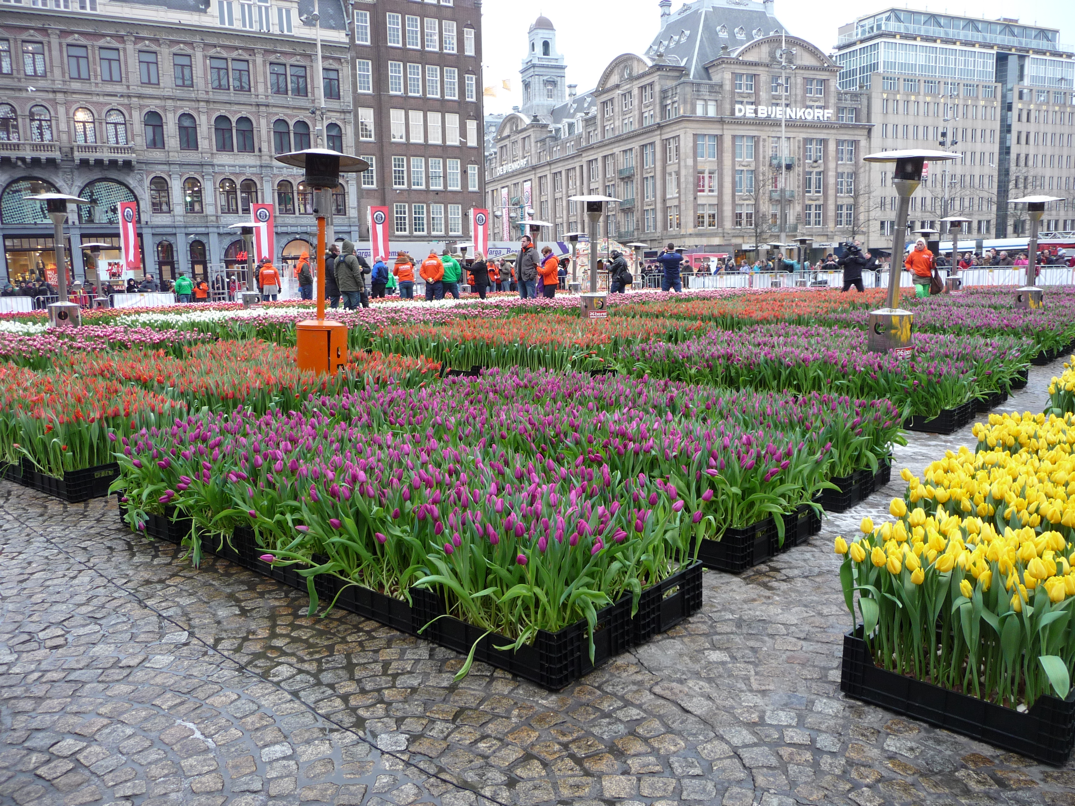 National Tulip Day